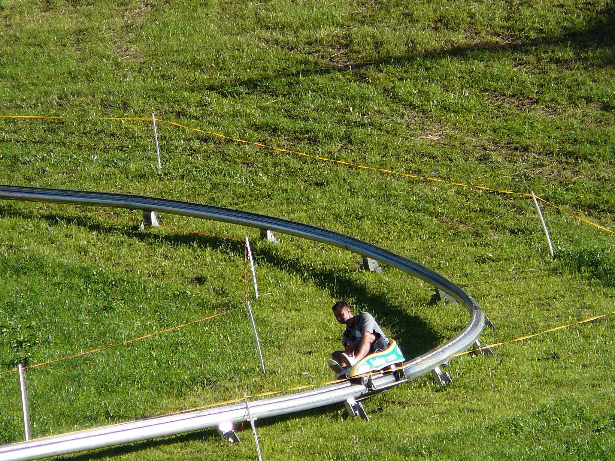 fun bob a san candido